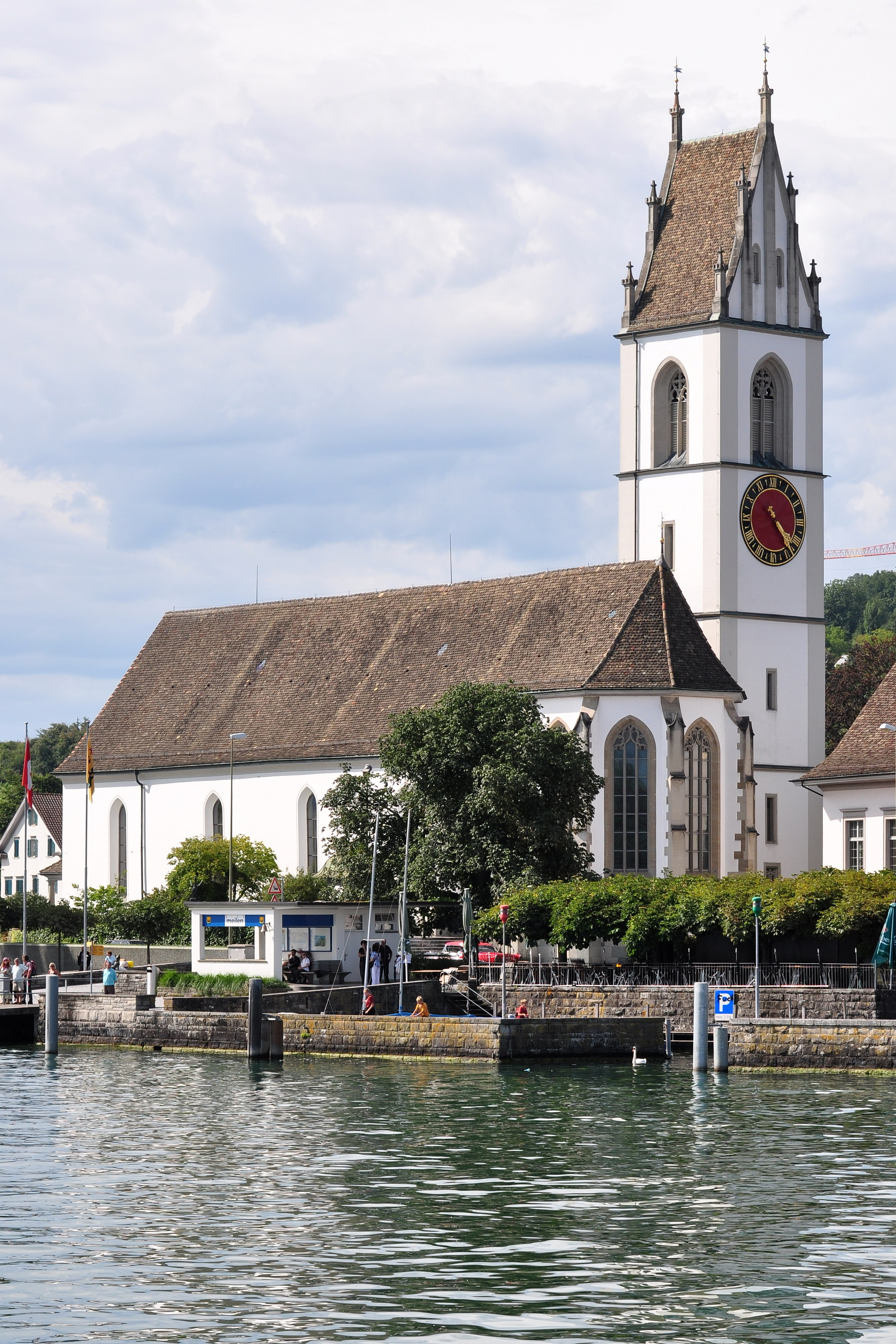 Reformierte Kirche in Meilen (Switzerland) as seen from Zürichsee-Schifffahrtsgesellschaft (ZSG) motorship Helvetia